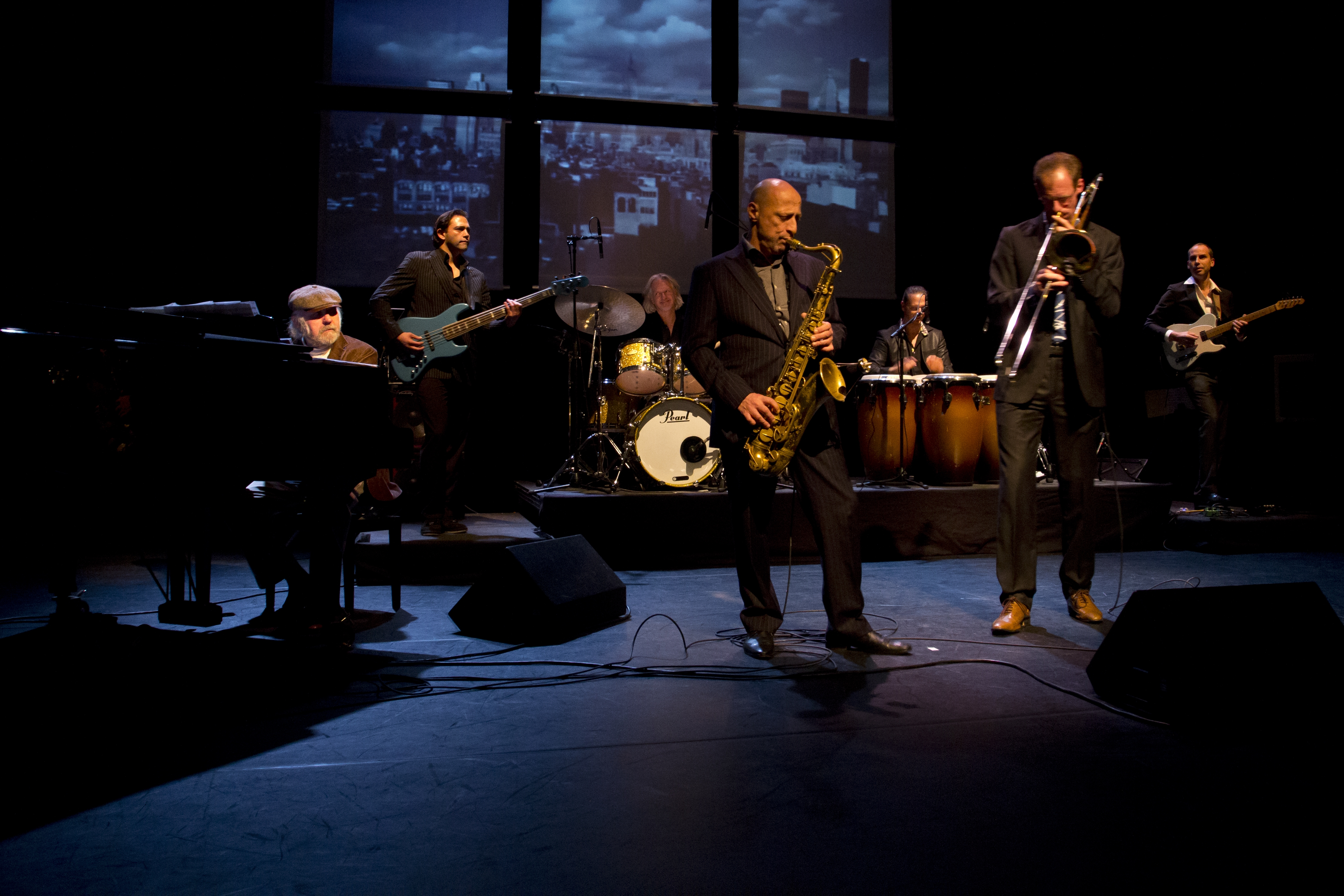 Optreden van de band Nueva Manteca.